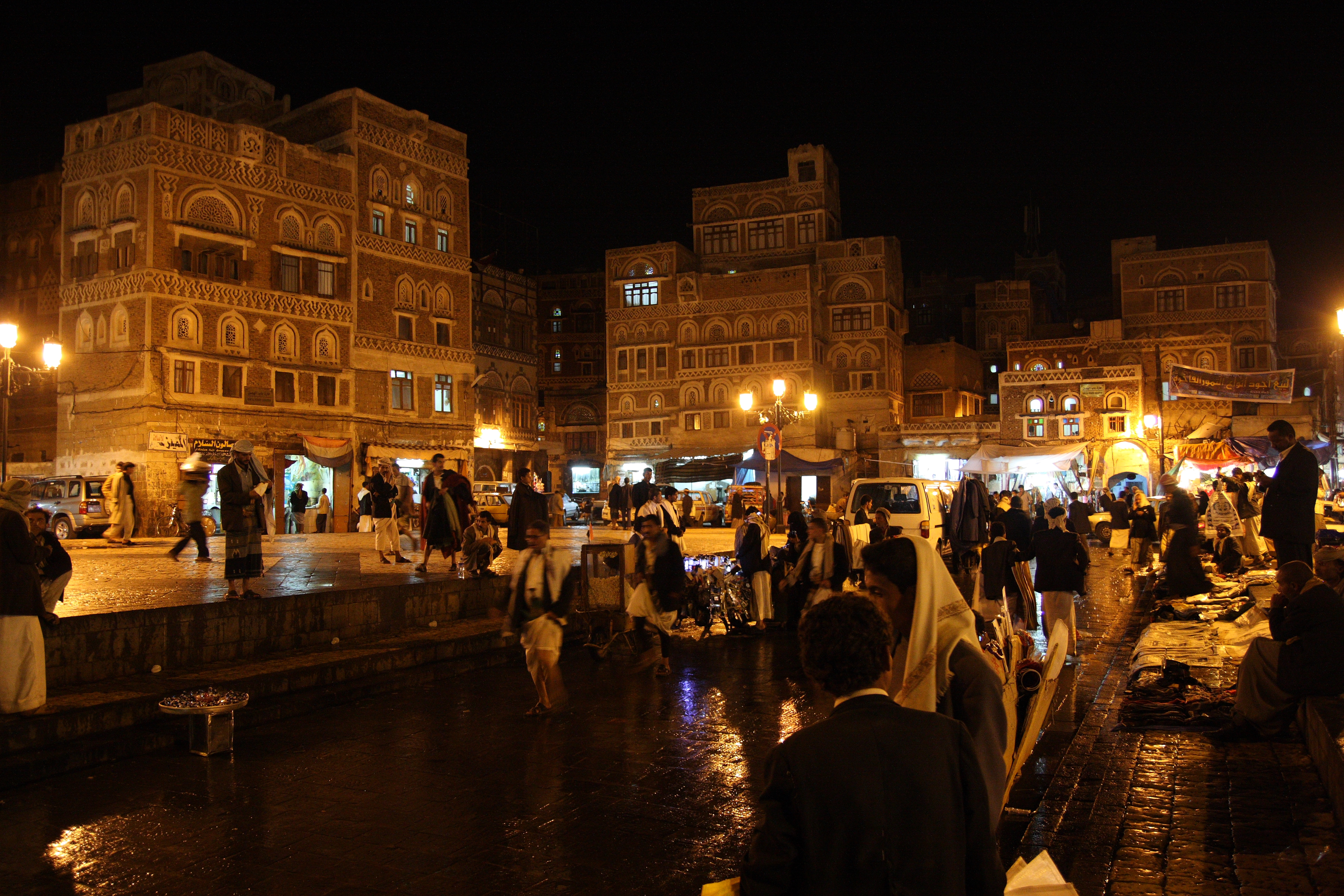 Night streetscene in Sana'a, Yemen